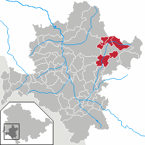 Verwaltungsgemeinschaft Haselgrund in Thuringia - District Schmalkalden-Meiningen